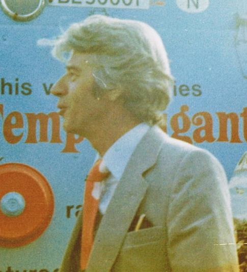 Entertainer Rudi Carrell in 1976